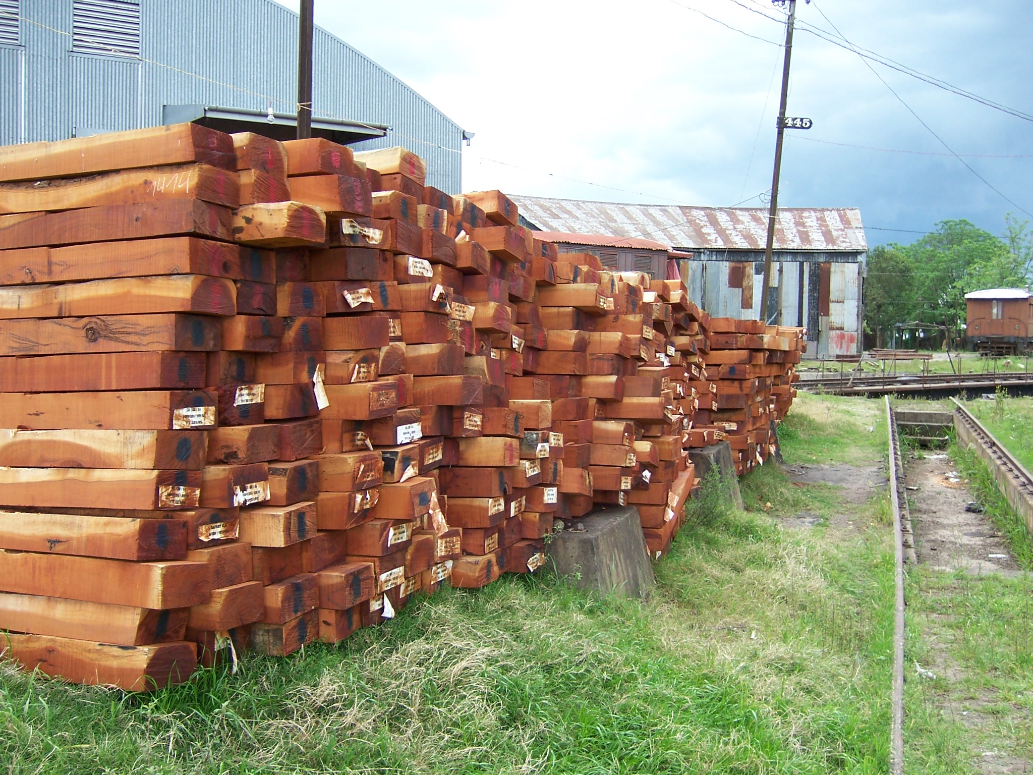 Durmientes de madera de quebracho colorado de origen argentino. Material utilizado en la renovación de la Línea a Rivera, zona de Tacuarembó, Uruguay. En el desvío a la derecha se observa una fosa para realizar mantenimiento al material rodante, y más atrás se observa la giratoria, elemento destinado a invertir el sentido de marcha de vehículos ferroviarios que lo requieren, normalmente vehículos antiguos.